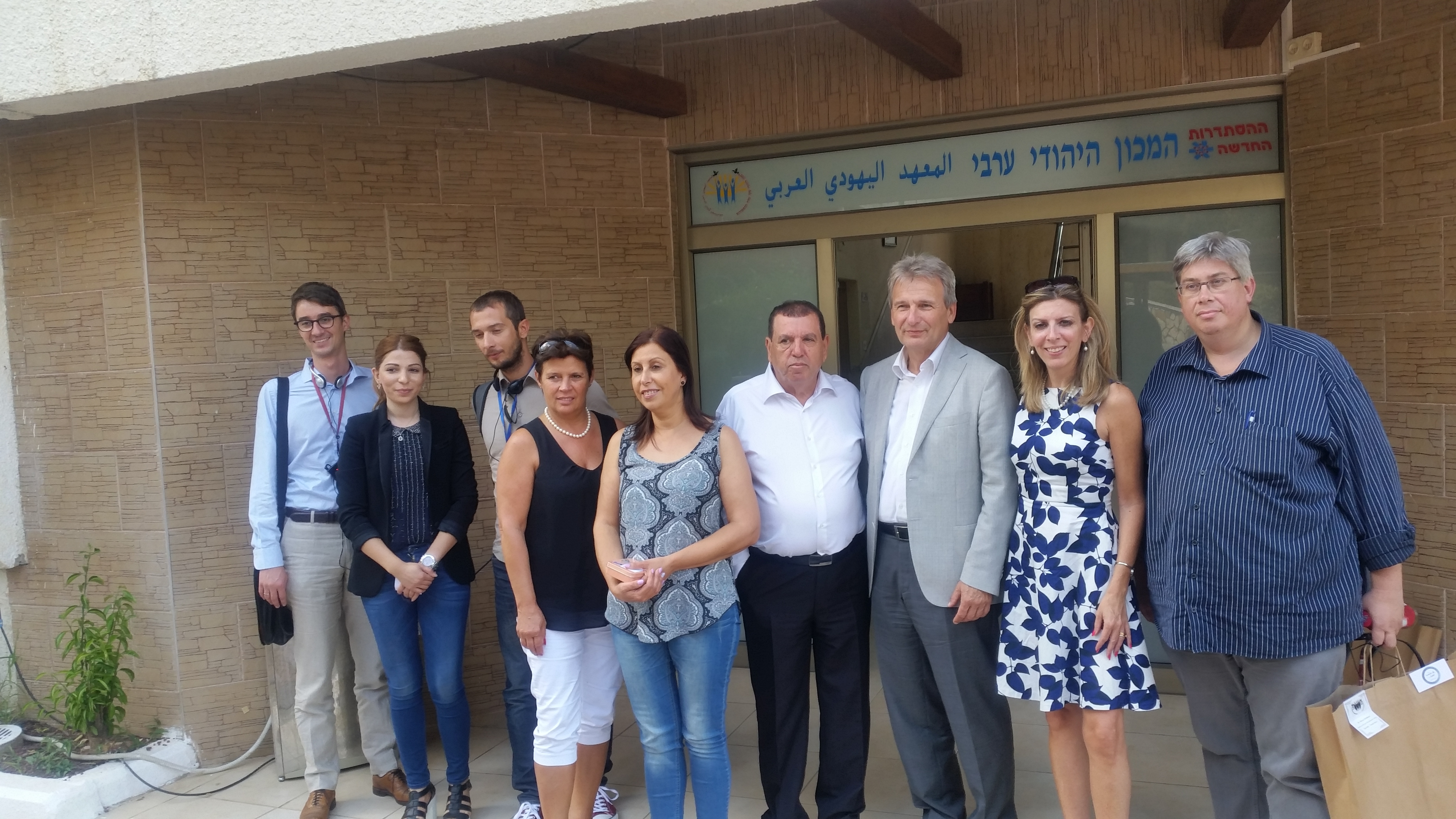 ביקור הנהגת פדרציית האיגודים המקצועיים האוסטרית בישראל. במרכז היהודי-ערבי של ההסתדרות בבית ברל.